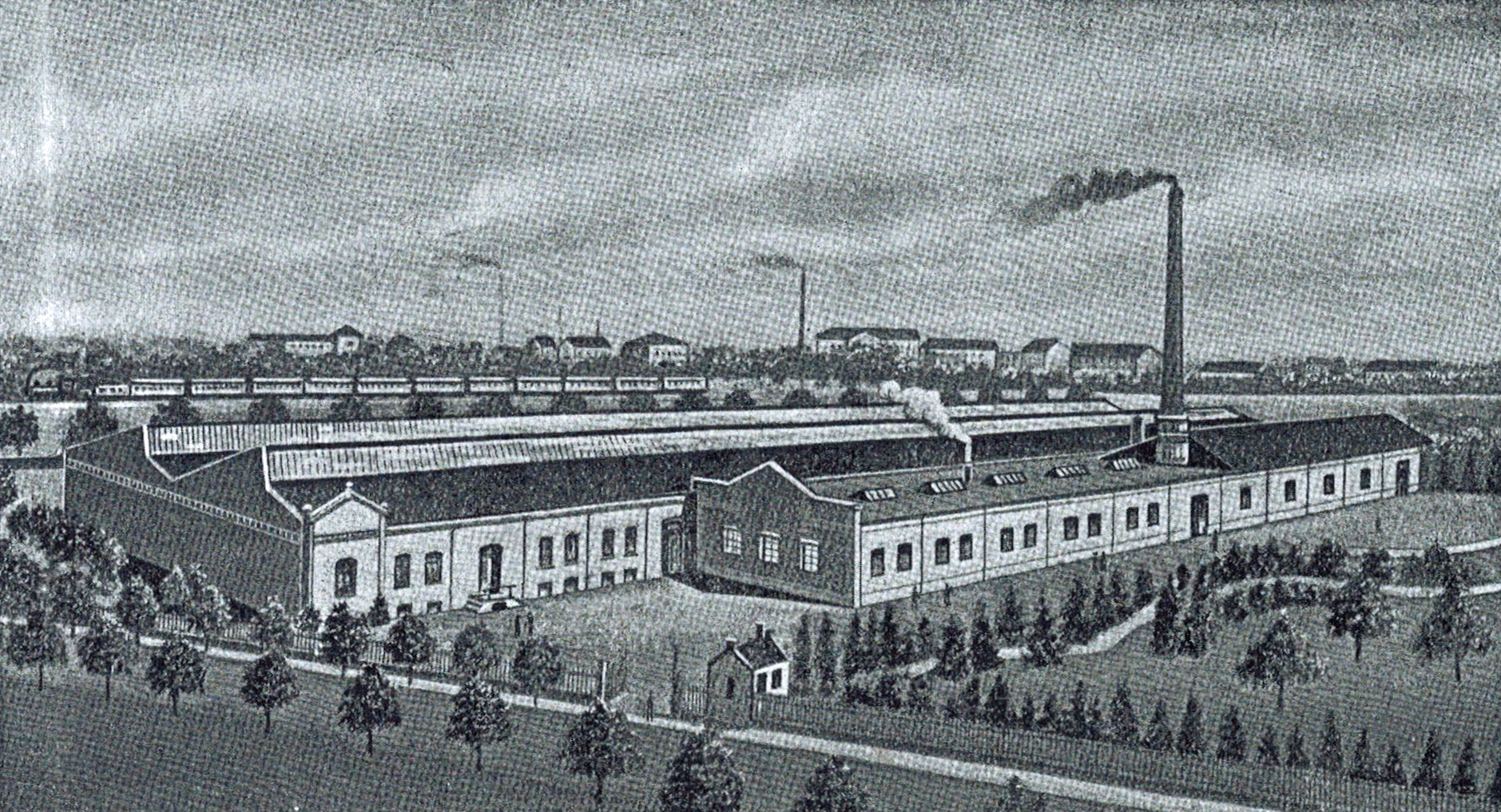 Polscher 2, früher